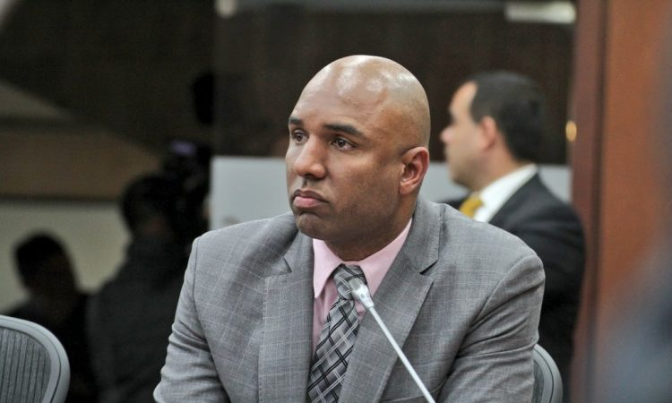 Juan Luis Castro Córdoba como senador en el congreso de la republica